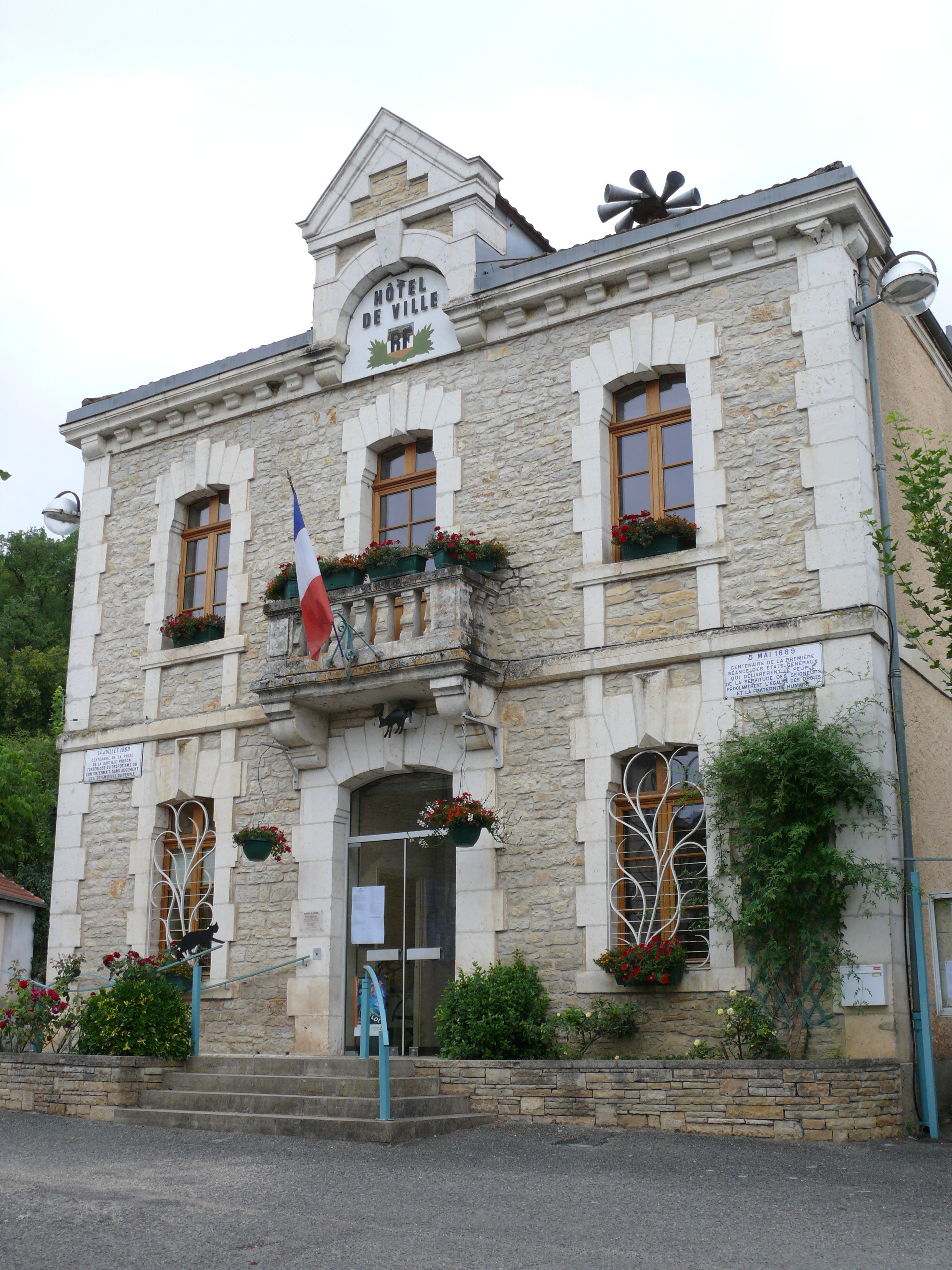 Catus - Mairie